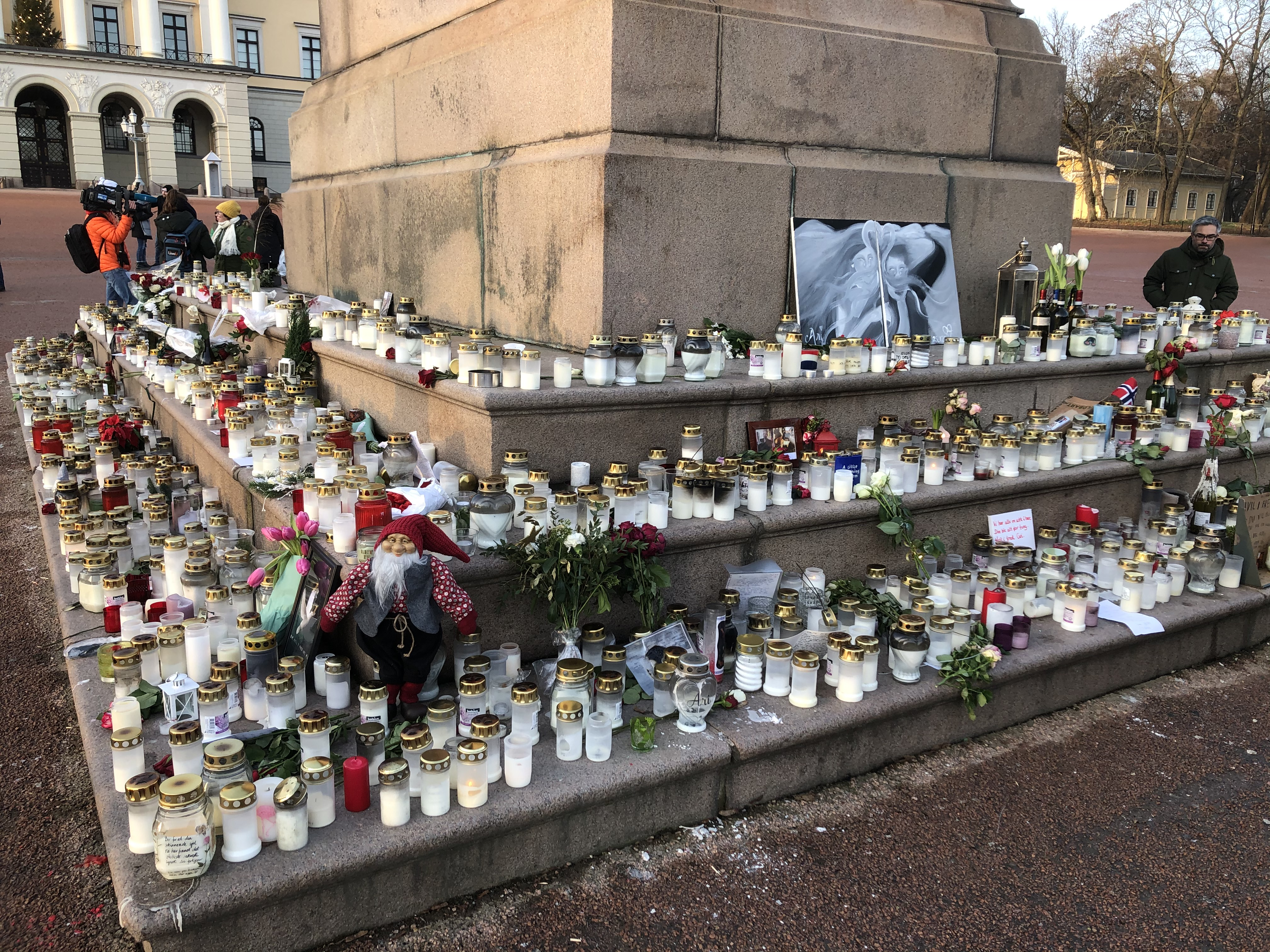 Mange la ned blomster, lys og minneord rundt Karl Johan-monumentet foran Slottet etter Ari Behns død.